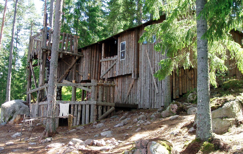 Bild på "björnarnas hus" som används i SVT-programmet "wild kids"